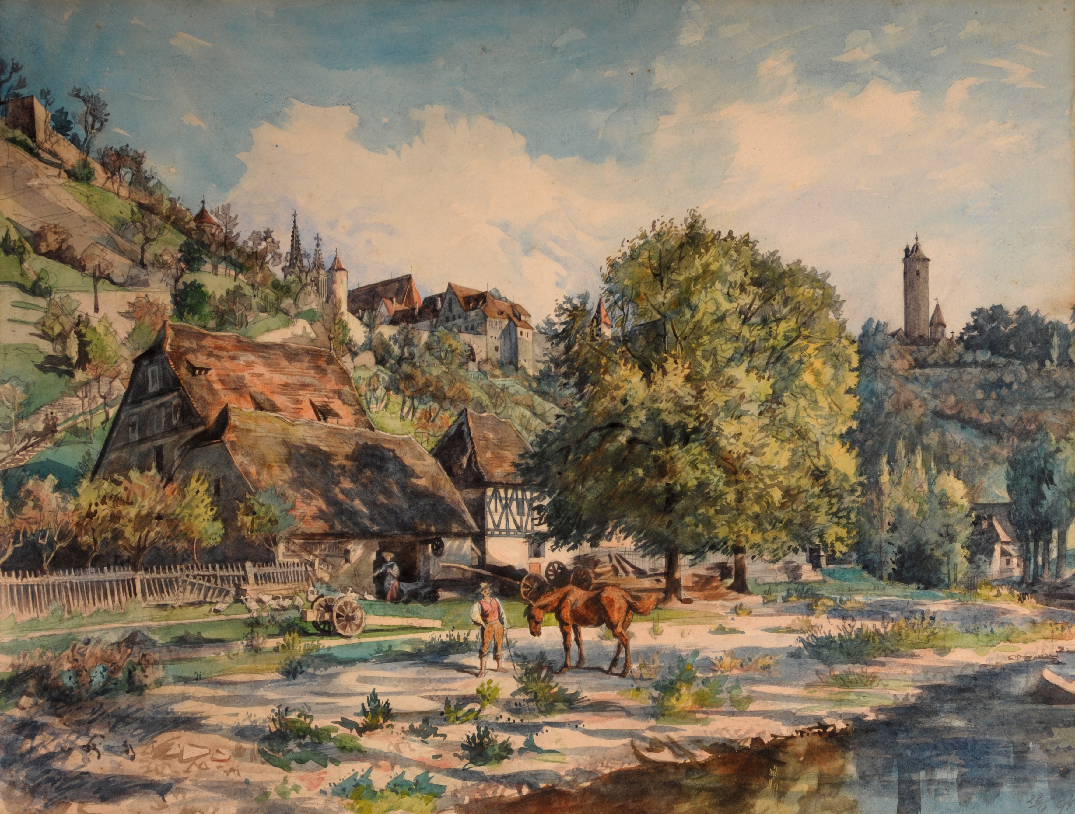 Die Bronnenmühle bei Rothenburg war damals noch in Betrieb als Getreide- und Sägemühle.